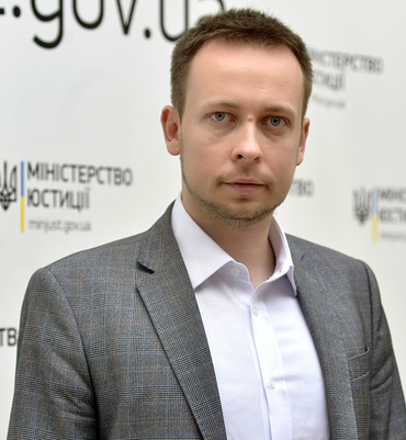 Андрій Гайченко